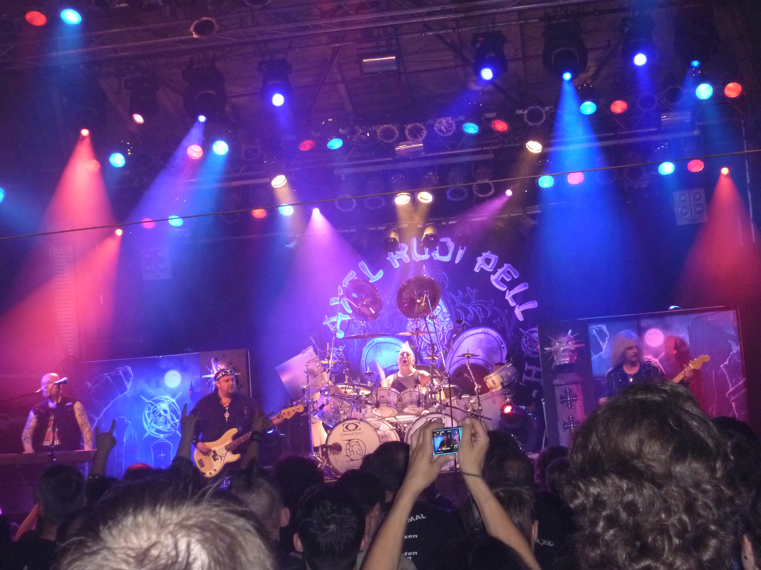 Axel Rudi Pell live in der Garage Saarbrücken